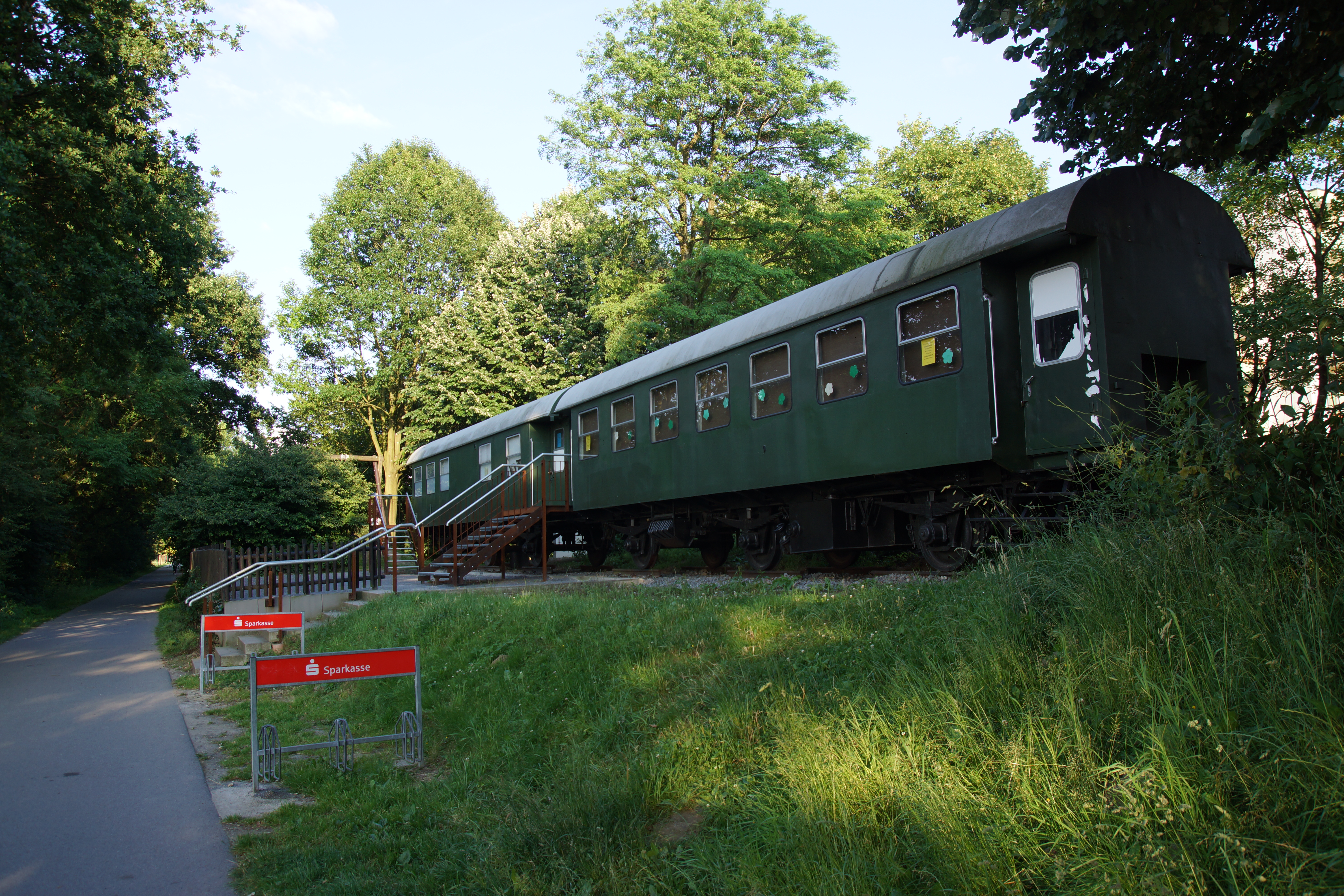 Solingen - Corkscrew route views (Korkenziehertrasse)